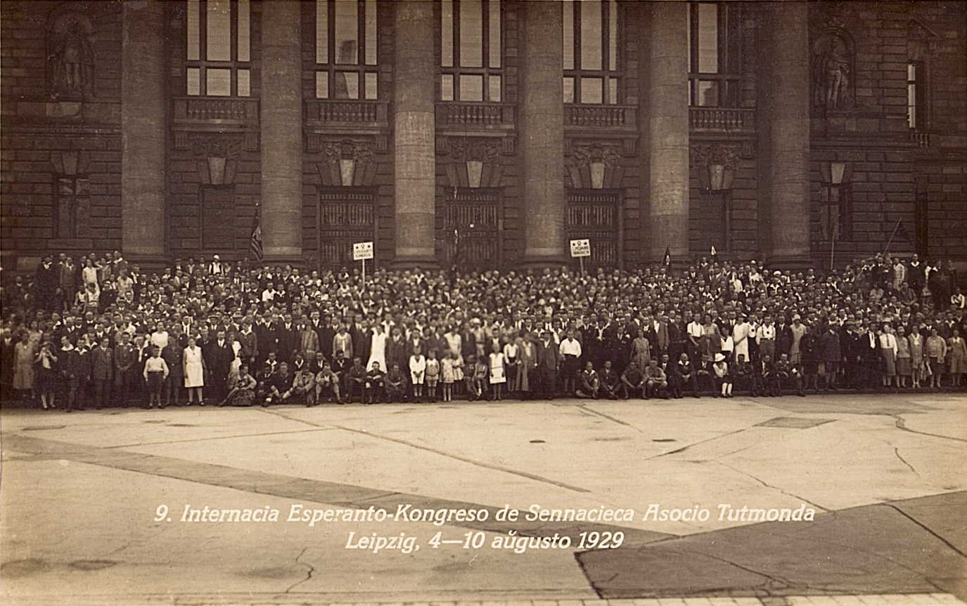 Komuna foto de partoprenantoj de la 9a SAT-kongreso en Leipzig, 4-10 de aŭgusto 1929